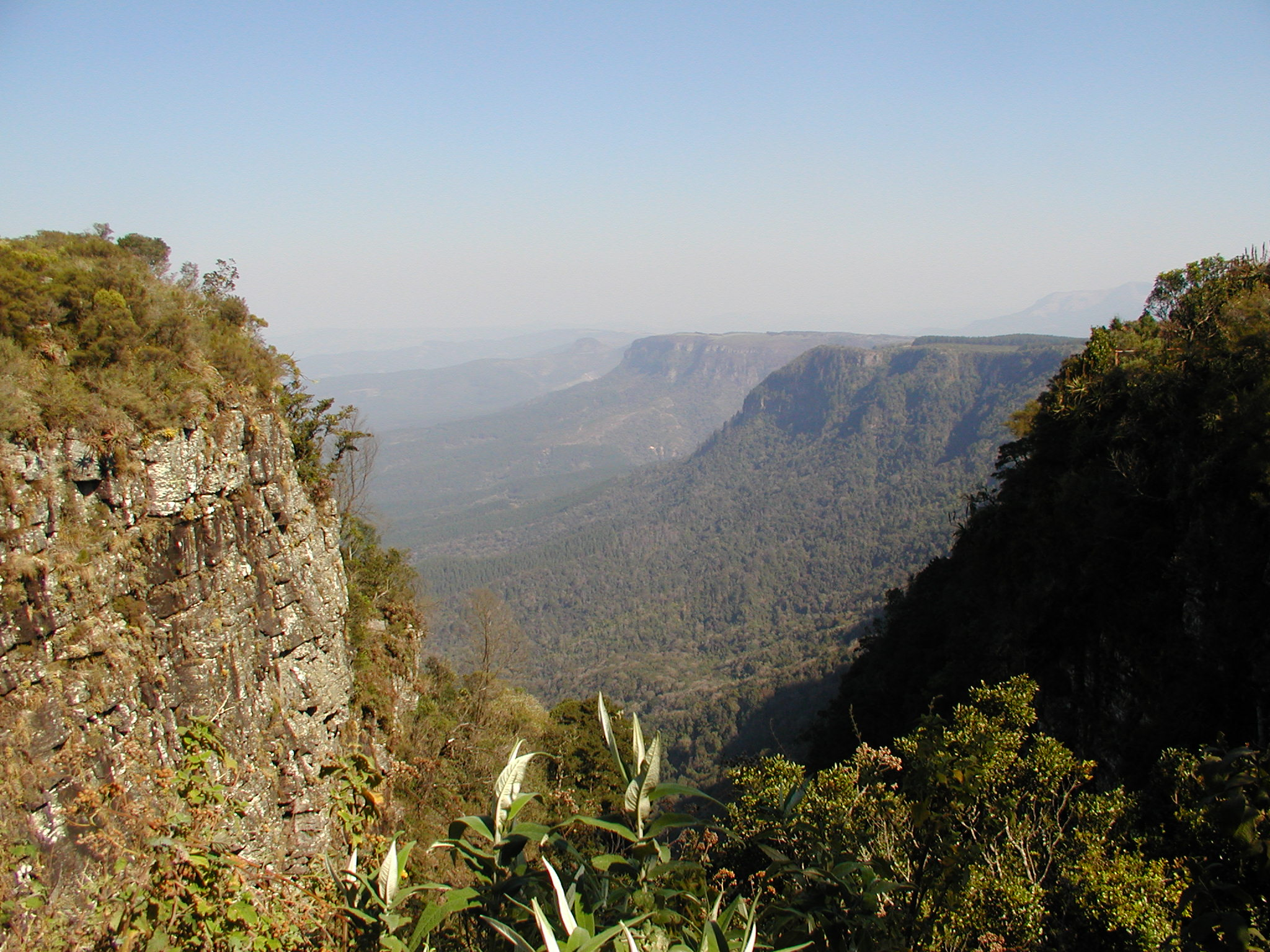 Uitsig vanaf God's Window na Graskop en Kowynspas